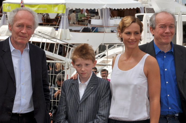 L'équipe du film "Le gamin au vélo" au festival de Cannes : de gauche à droite, Jean-Pierre Dardenne, Thomas Doret, Cécile de France, Luc Dardenne.